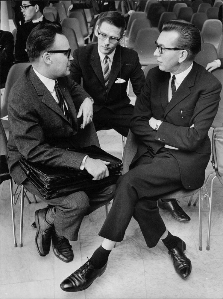 Baksidestext: "Barnavårdsnämndens debatt om alkohol-narkotika på Stockholms-terrassen.... Fr.v. Tf prof. Kjell Bjerver, riksdagsman Ola Ullsten och dr Nils Bejerot." Införd i Svenska Dagbladet 1967-02-06 s. 6 (